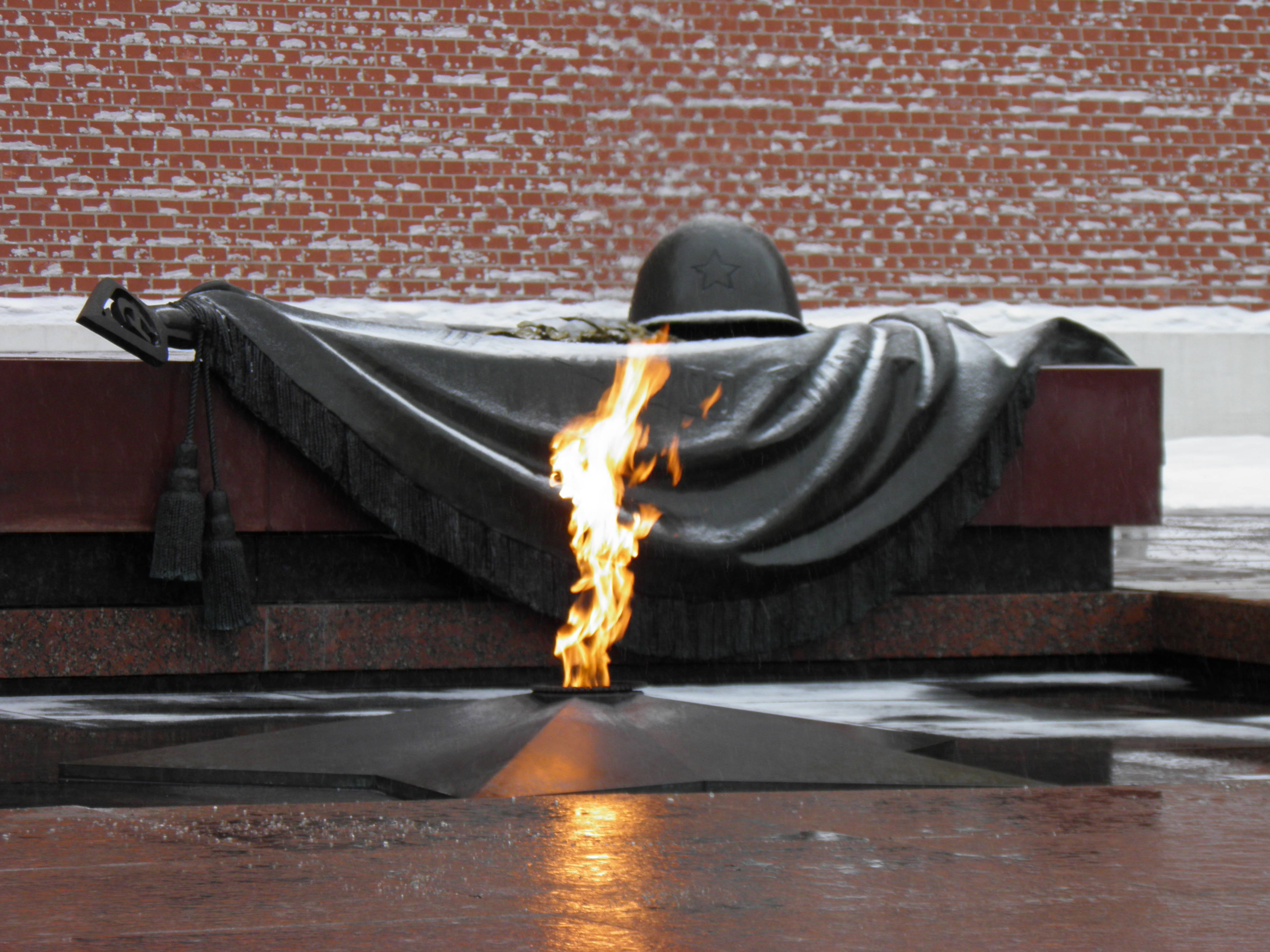 Flamme éternelle à Moscou (Russie).